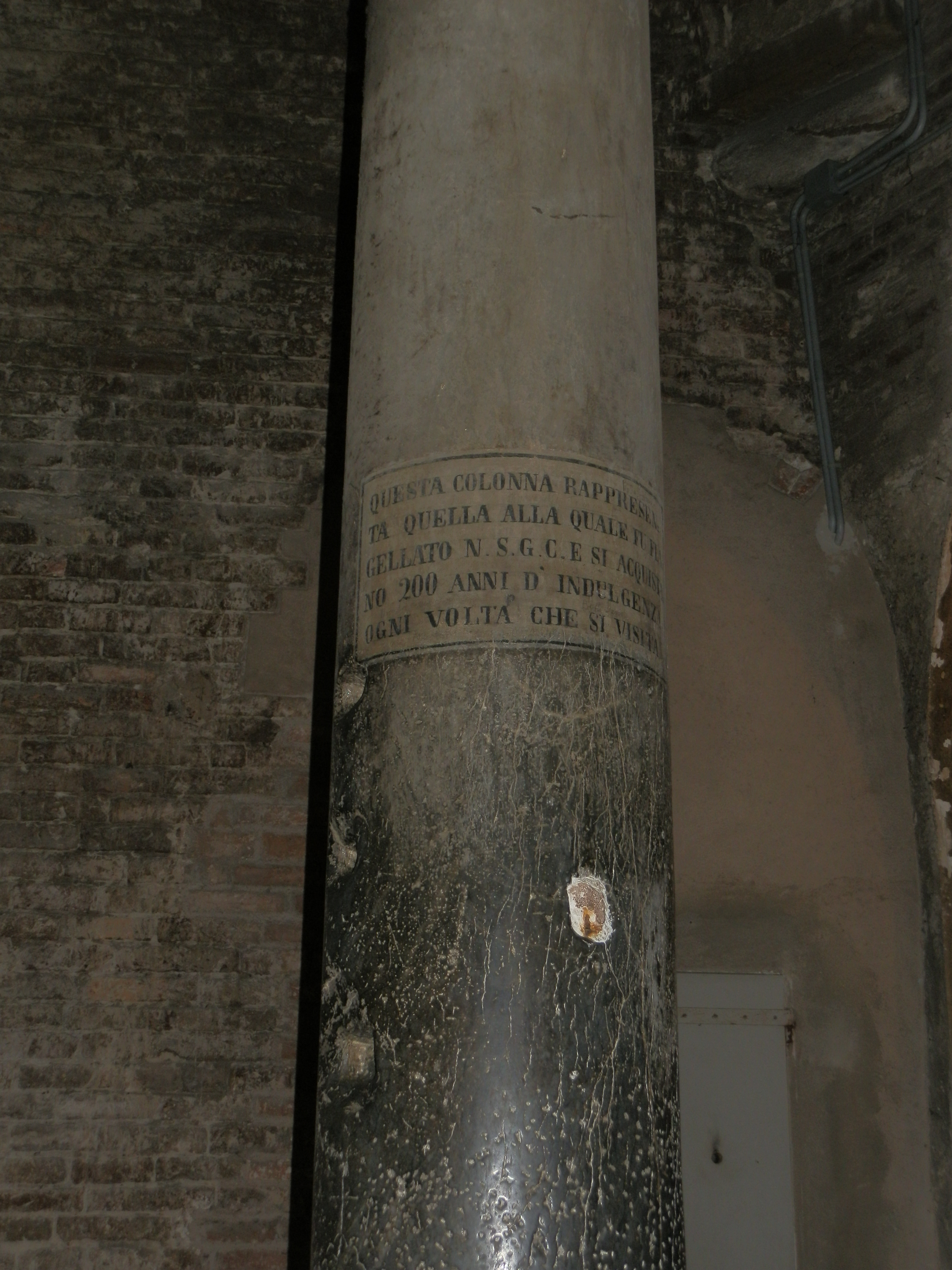 Piazza Santo Stefano - MIBAC This is a photo of a monument which is part of cultural heritage of Italy.